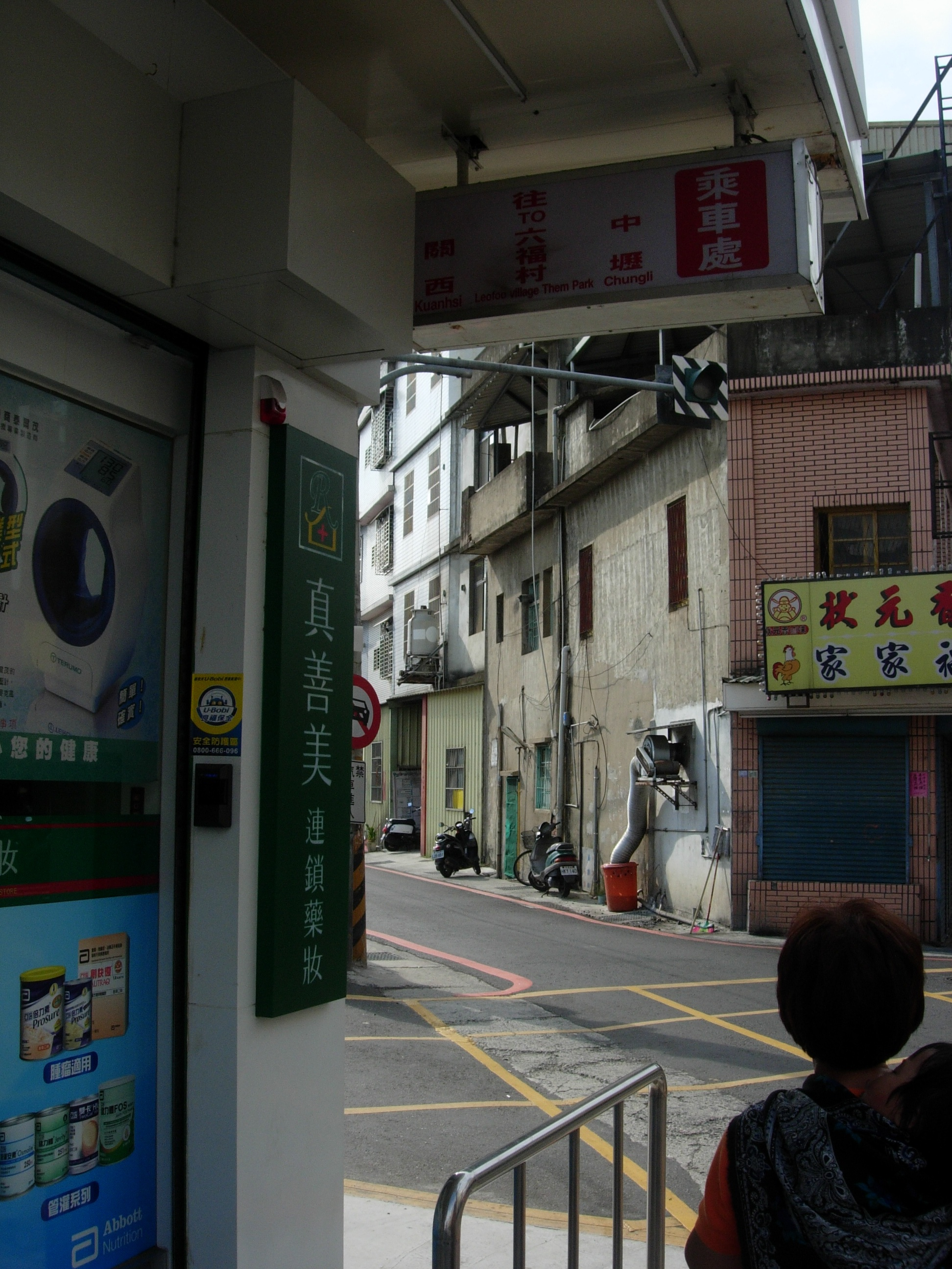 中文（台灣）: 新竹客運新埔站月台2